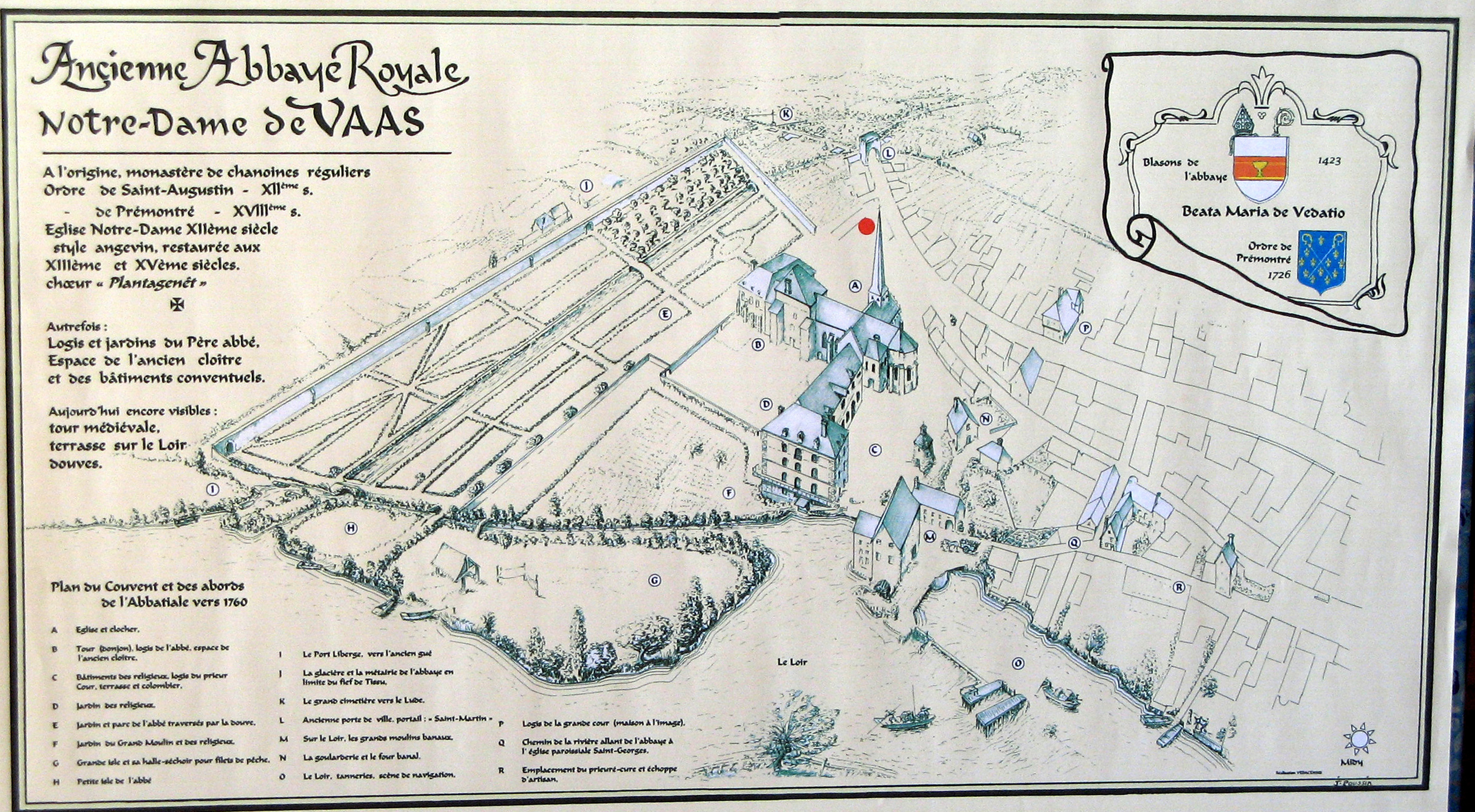 Réconstitution de l'Abbaye Royale Notre-Dame de Vaas en 1760